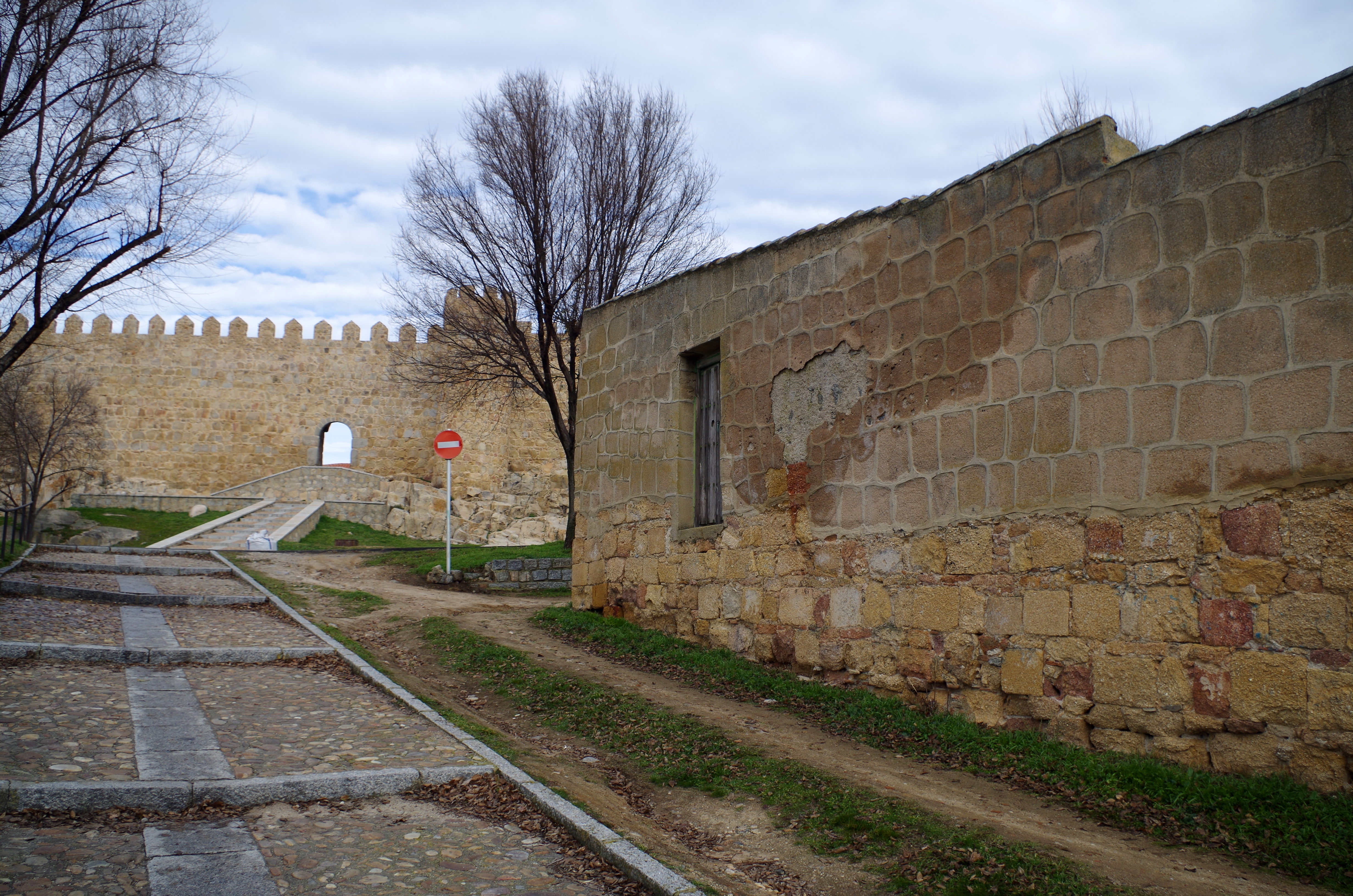 Edificación donde se reutilizaron piedras de la ermita de San Pelayo o San Isidro, y la muralla, puerta de la Malaventura o del atrio de San Isidro o de los Gitanos, Ávila, España